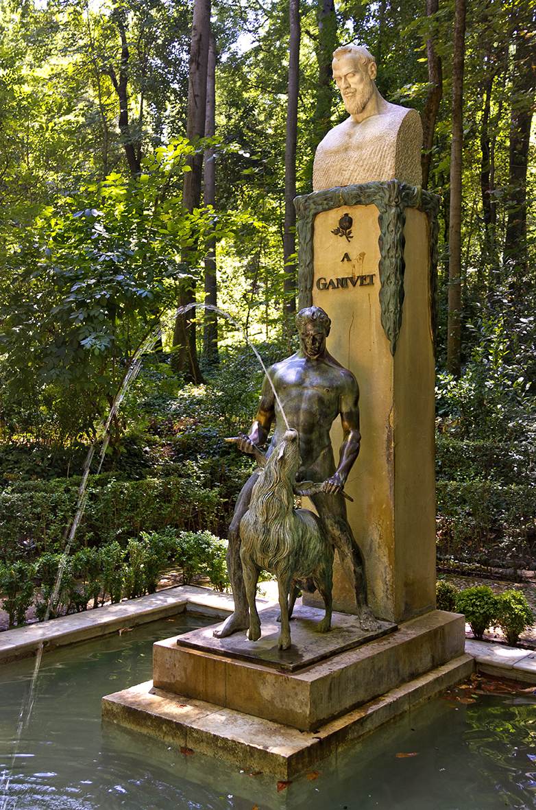 Monumento a Ángel Ganivet en el camino hacia la Alhambra